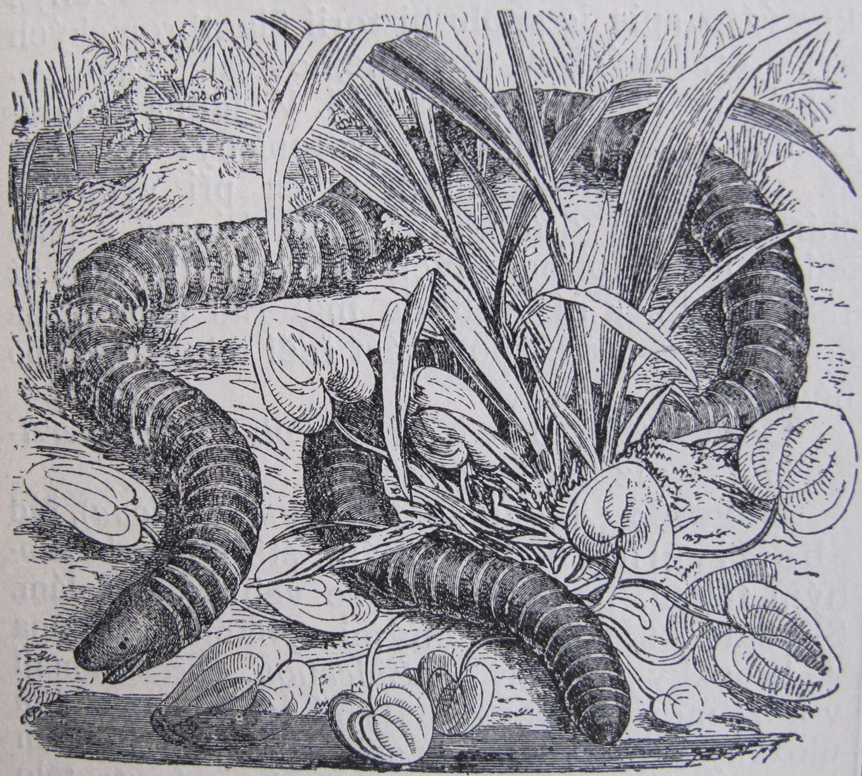 Původní popisek: Č. 966. Červor kroužkovaný (Siphonops annulata Wagl.).